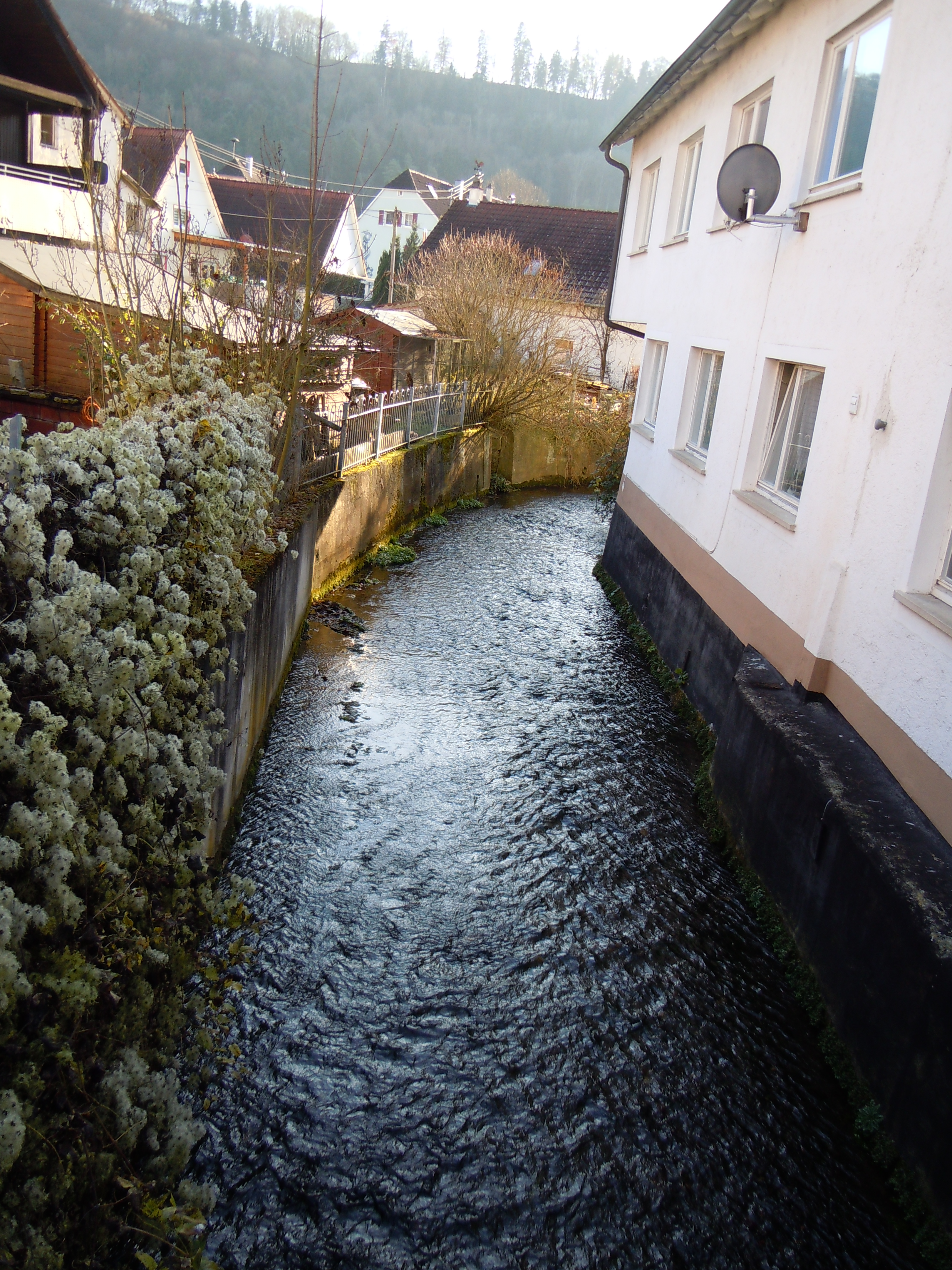 Blick von der Brücke Lammstraße in Mühlen am Neckar auf den Eutinger Talbach, Blickrichtung Süd